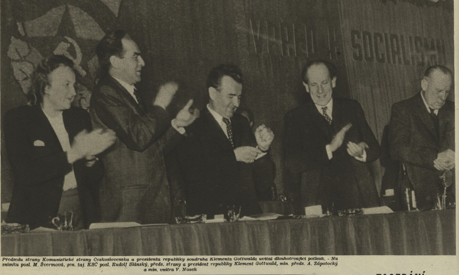 Marie Švermová na tribuně zasedání Ústředního výboru KSŠ (1948); zleva Švermová, Slánský, Gottwald, Zápotocký, Nosek